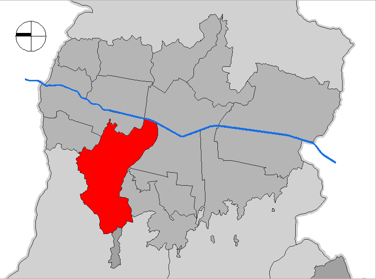 mapa de la comuna Robledo. Medellín, Colombia.